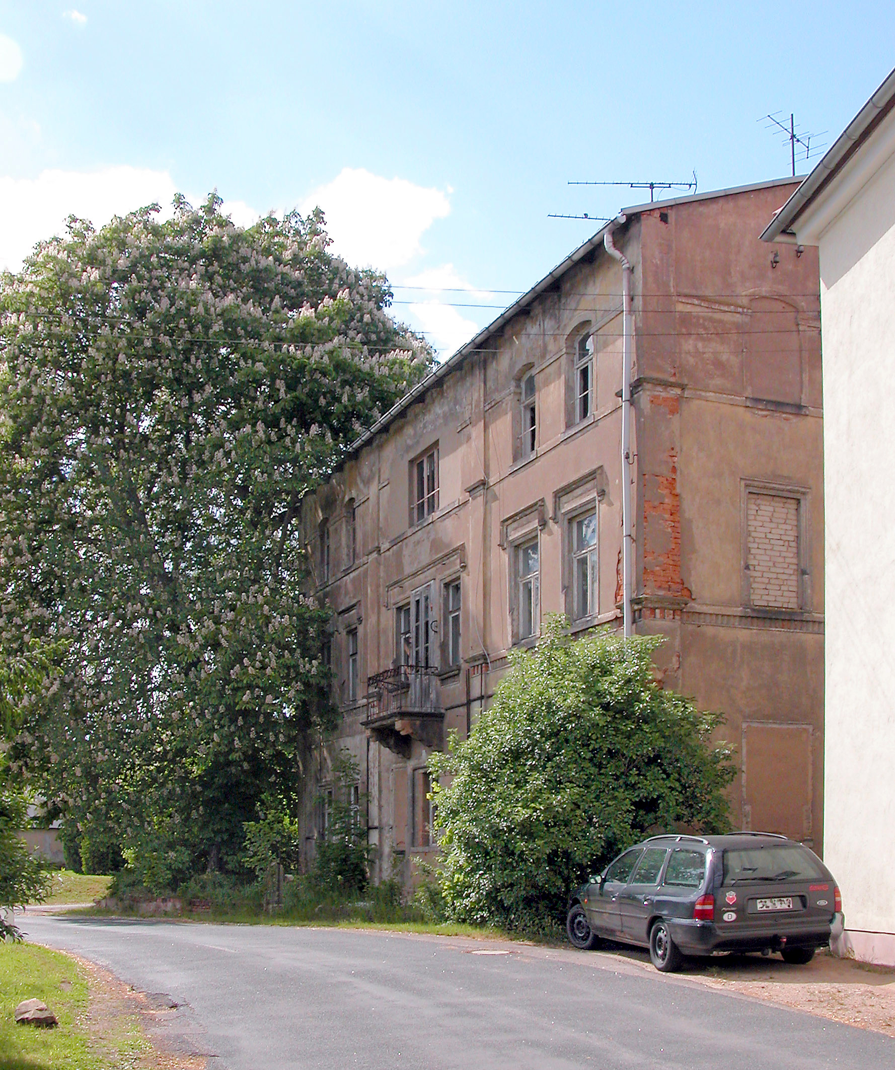 24.05.2006 04720 Gärtitz (Döbeln), Am Ring (GMP: 51.143737,13.118117): Herrenhaus des 1292 erstmal erwähnten Ritterguts. Es gehörte der Adelsfamilie Marschall von Mockritz und ging 1469 an die Familie von Polenz (auch: Polentz) über, die es über Jahrhunderte im Besitz hatte. 1929 wird das Rittergut aufgelöst und das Land für Siedlungszwecke 1933 aufgeteilt. Das Rittergutsgelände gehörte seitdem verschiedenen privaten Eigentümern. Im Herrenhaus brachte man Wohnungen unter, doch seit vielen Jahren war das Gebäude nicht mehr bewohnt und verfiel. 2009 wurde es abgebrochen. Sicht von der Straße vor dem Abbruch. [DSCN10266.TIF]20060524260DR.JPG(c)Blobelt